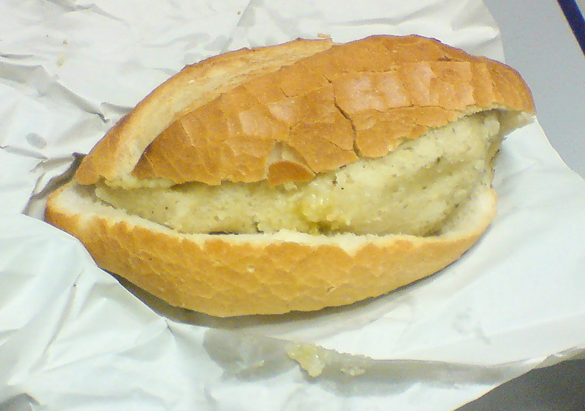 Torta de Tamal, conocida como Guajolota